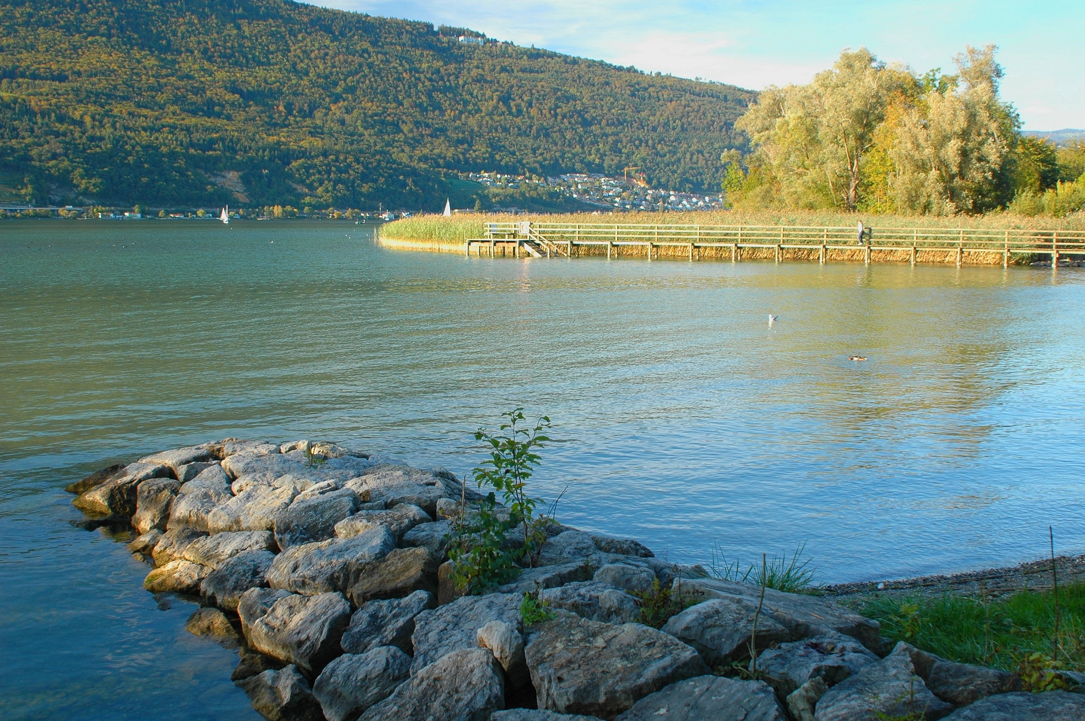 Dieses Bild zeigt den Seeanstoss in Sutz